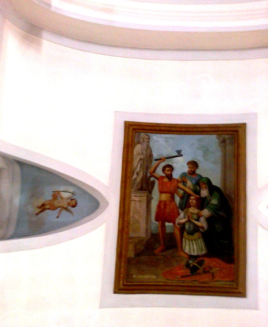 affresco del Martirio di San Marcello Centurione